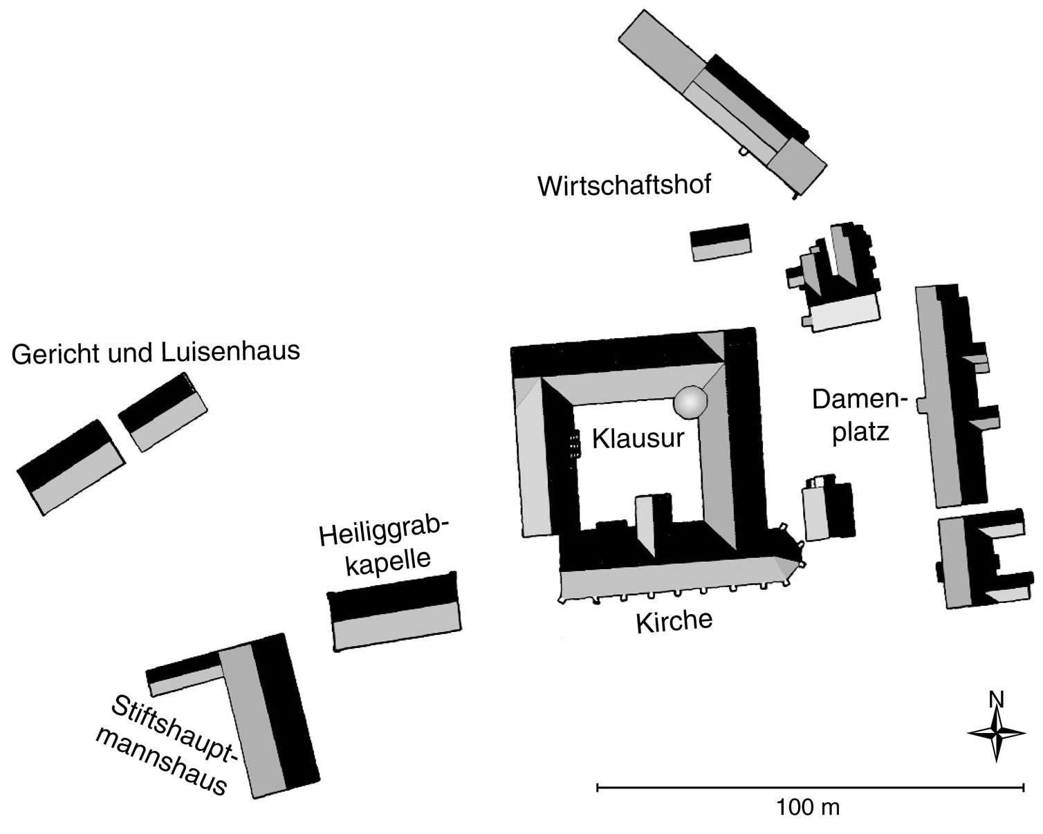 Lageplan Innenbereich Klosteranlage Heiligengrabe